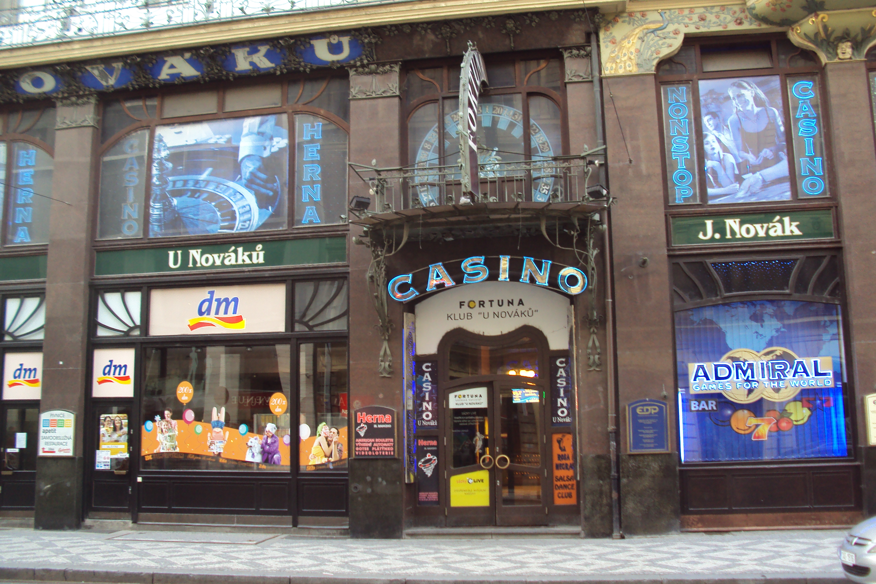 U Nováků, Praha 1, Vodičkova ulice